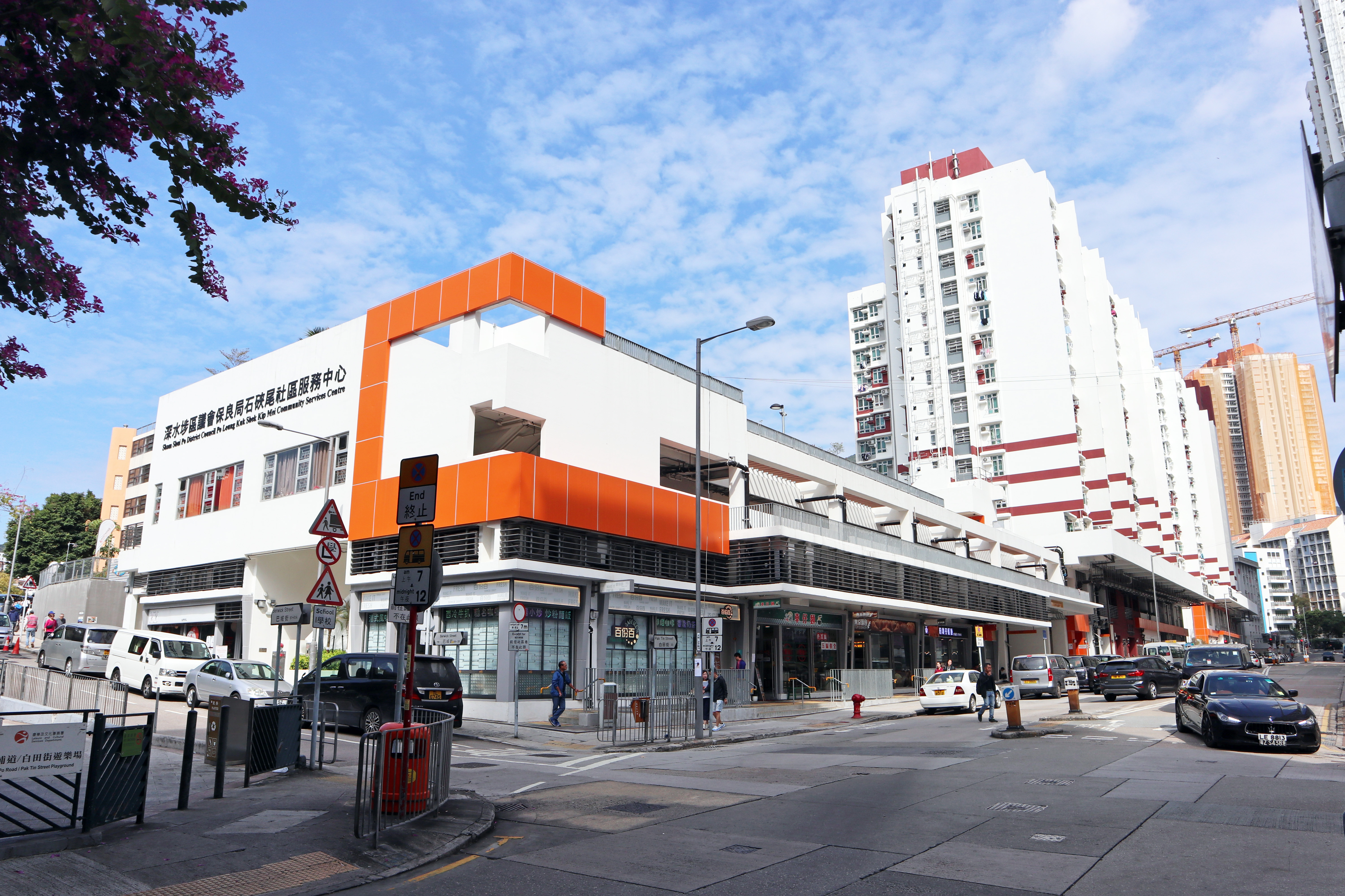 石硤尾邨美葵樓、美菖樓